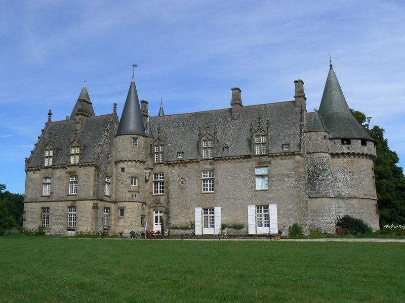 Château de Bonnefontaine aile ouest à Antrain (Bretagne)